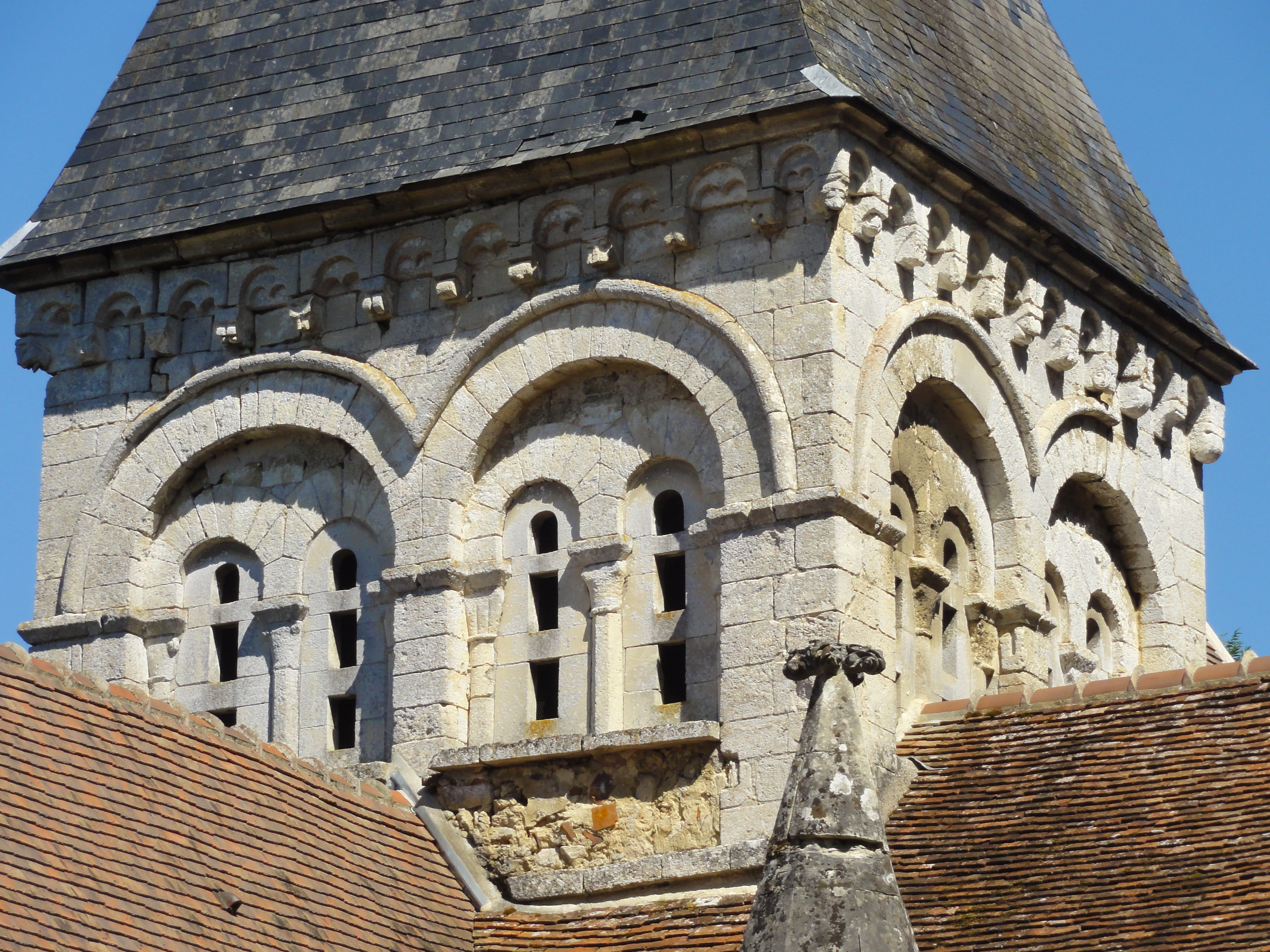 Église Saint-Martin d'Heilles (voir titre).